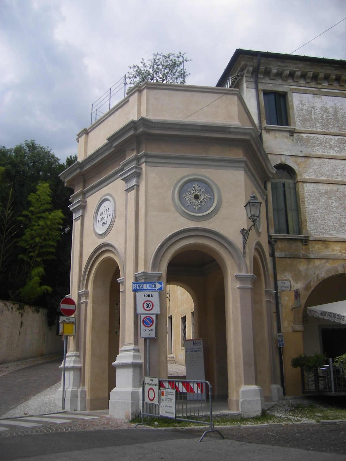 Conegliano, Porta Dante (XIX secolo)